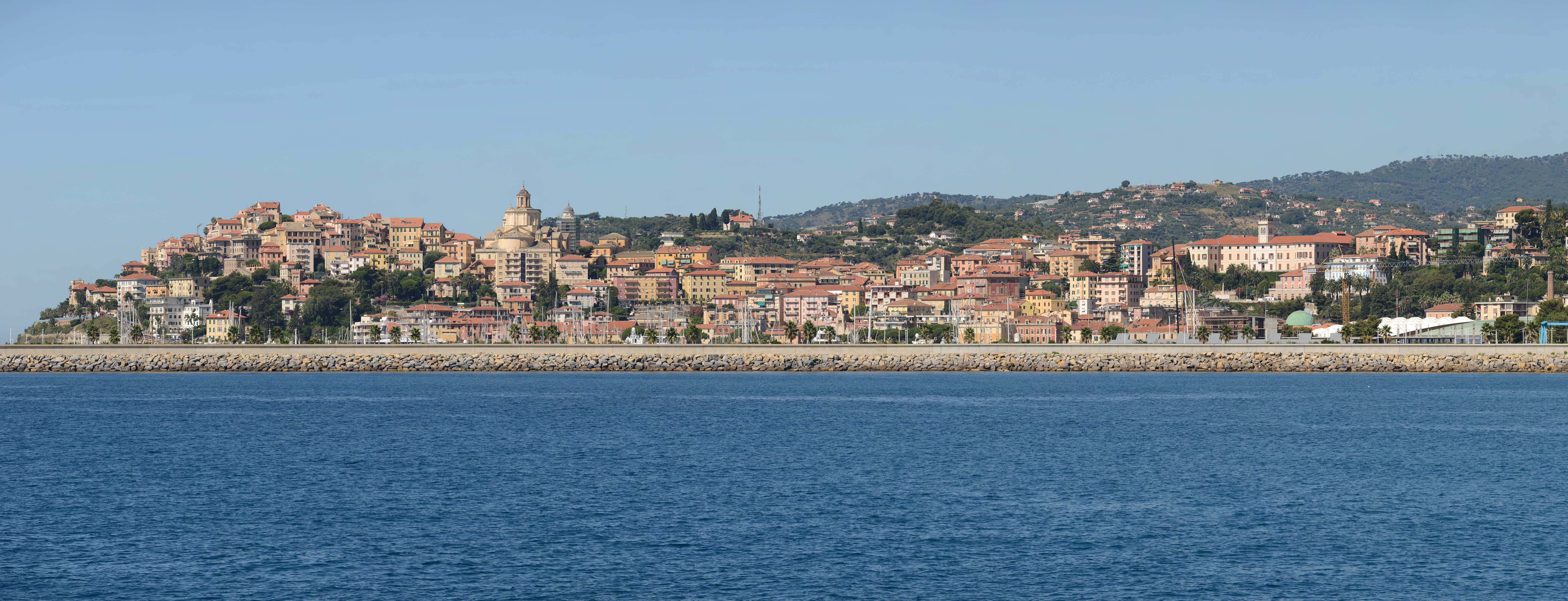 Imperia ist eine italienische Hafenstadt mit ca. 42.000 Einwohnern in Ligurien an der Riviera di Ponente und Hauptstadt der Provinz Imperia. Das alte Porto Maurizio mit seinem Yachthafen im Westen Oneglias weist einige monumentale historische Gebäude auf. NOTE: This image is a panorama consisting of multiple frames that were merged or stitched in software. As a result, this image necessarily underwent some form of digital manipulation. These manipulations may include blending, blurring, cloning, and colour and perspective adjustments. As a result of these adjustments, the image content may be slightly different from reality at the points where multiple images were combined. This manipulation is often required due to lens, perspective, and parallax distortions.